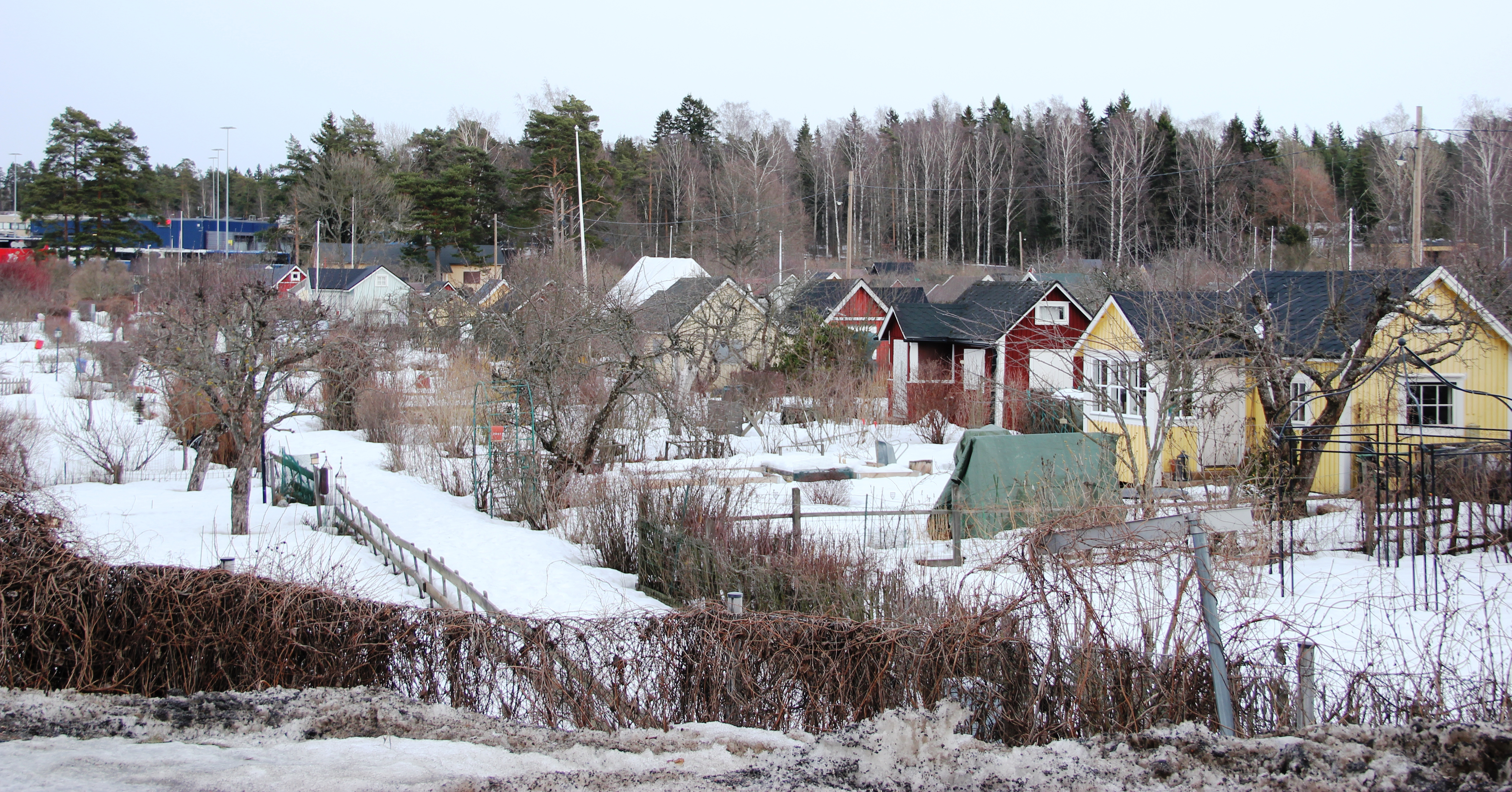 Ruskeasuon siirtolapuutarha, Ruskeasuo, Helsinki (vain ruotsinkielisille